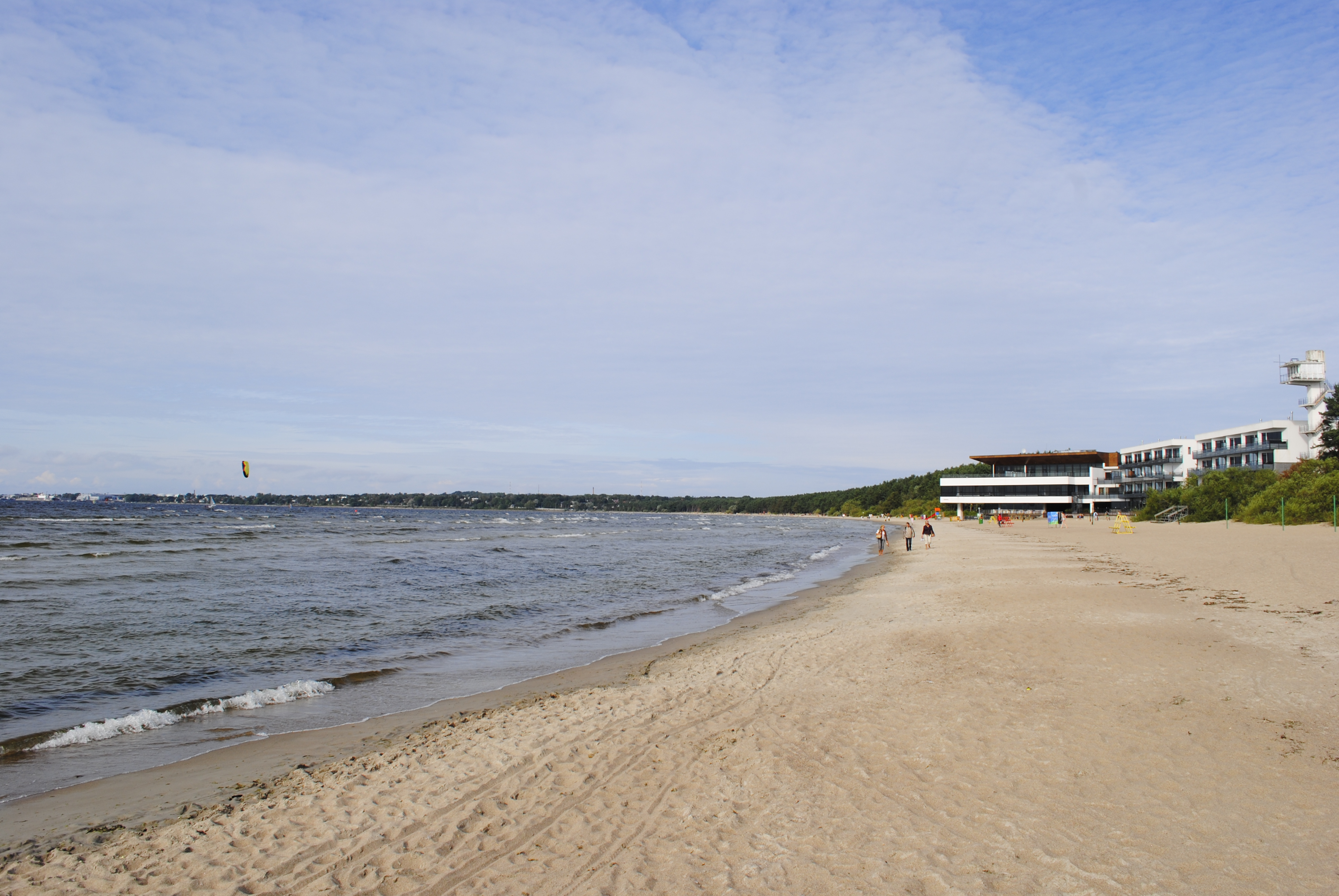 Der Strand in Pritia (Tallinn)